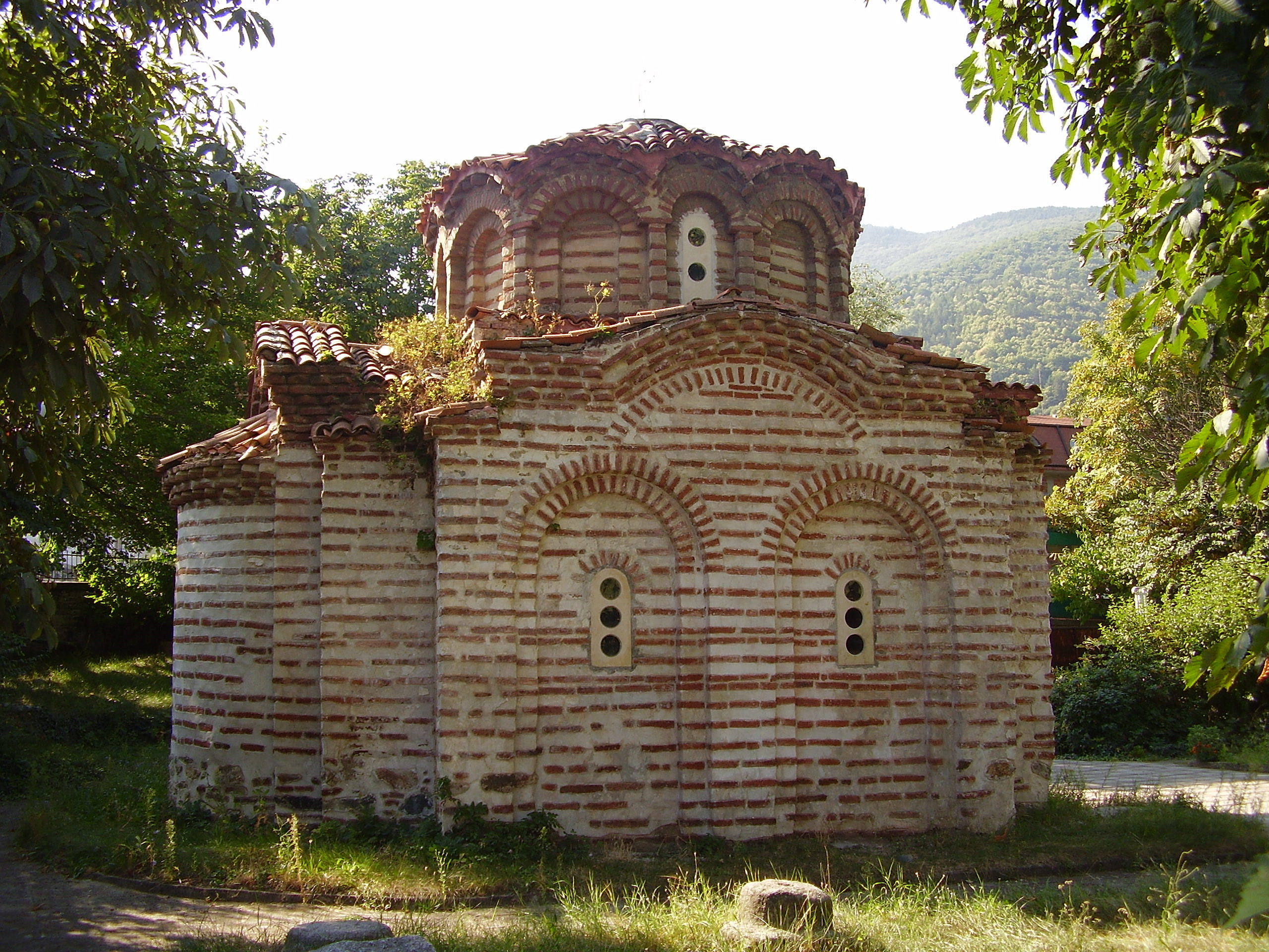 Средновековна църква "Свети Никола" - гр.Сапарева баня